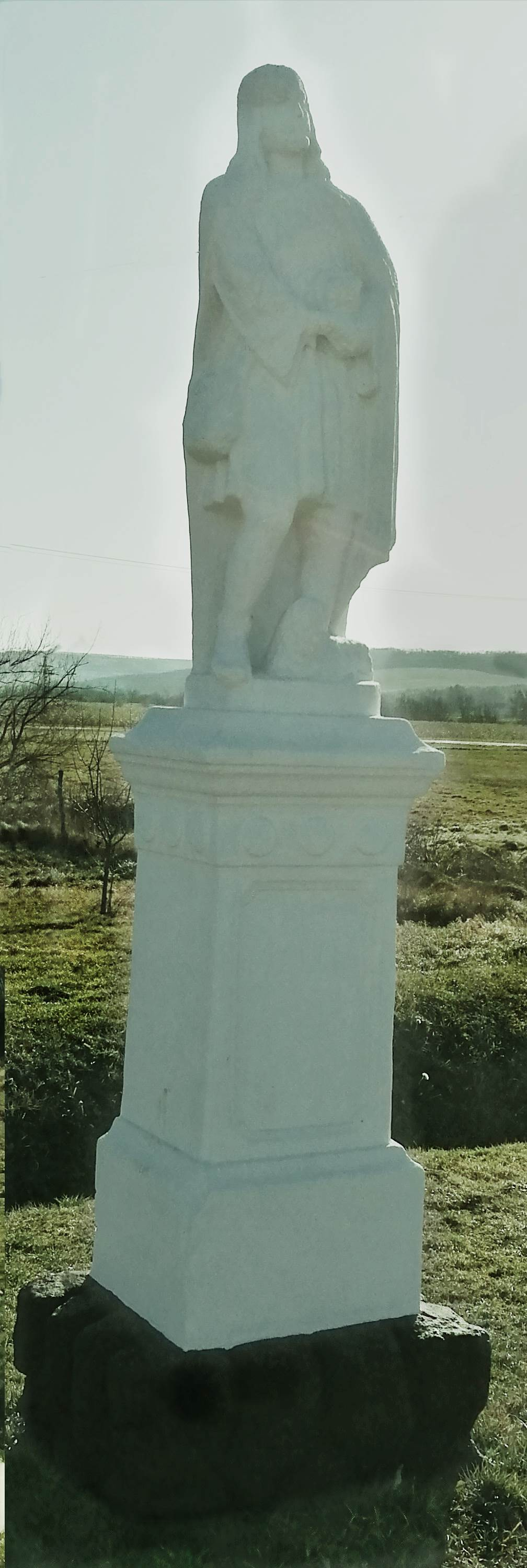 Nagykónyi szent vendel szobor